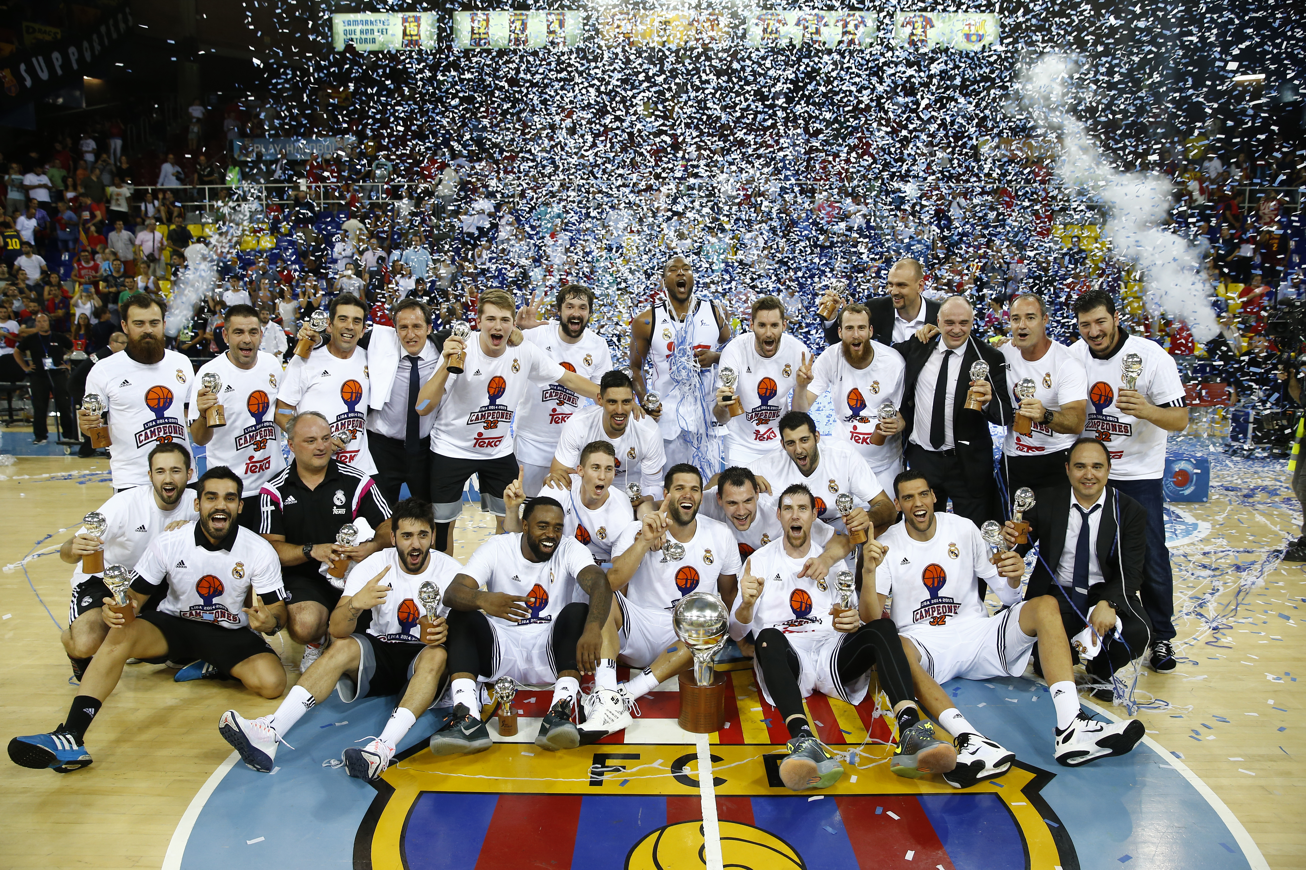 Los jugadores del Real Madrid, campeones de la Liga Endesa.